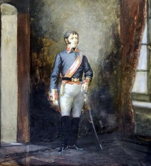 Gobernador de la intendencia del Paraguay Bernardo de Velasco.